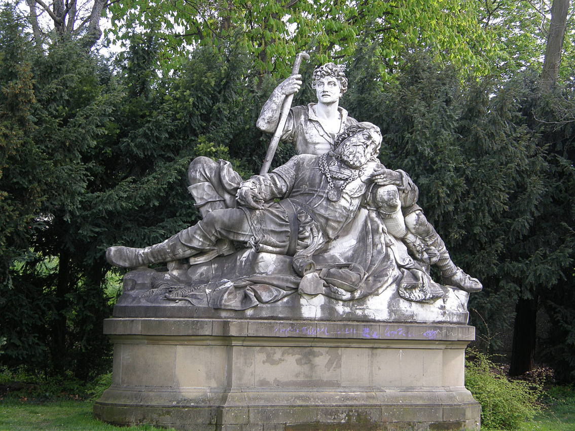 Eberhardsgruppe im mittleren Schlossgarten nach dem Motiv des Gedichts "Der reichste Fürst" von Justinus Kerner